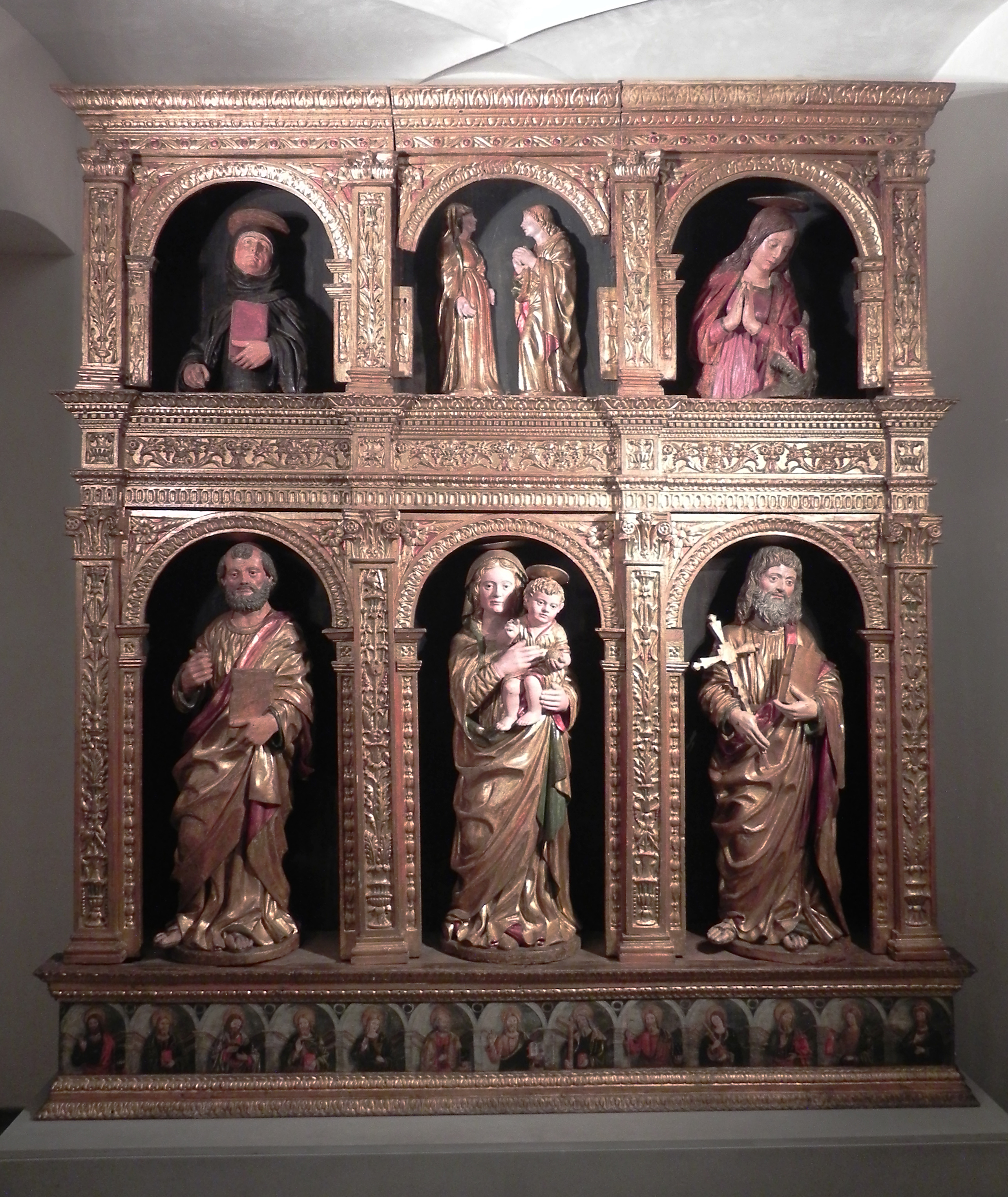 Fascia inferiore (da sinistra) San Pietro, Madonna con bambino, Sant Andrea - Fascia superiore (da sinistra) Sant Agostiniano, Maria Vergine con San Giovanni, Santa Margherita d'Antiochia